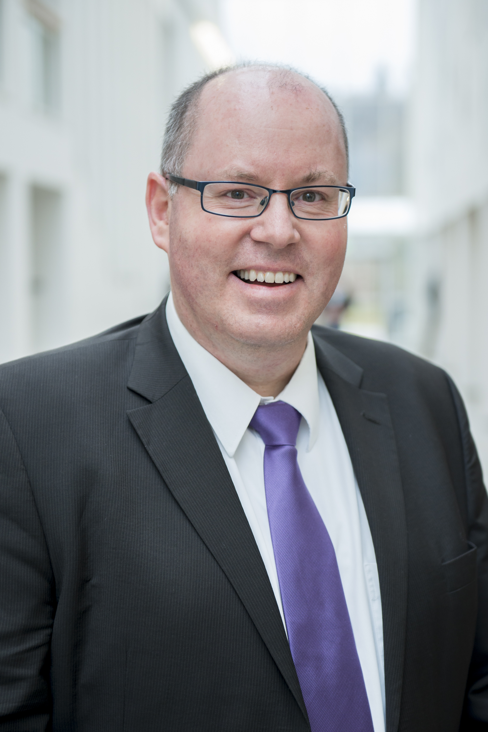 Foto_Robert_Esser_ 2016.jpg